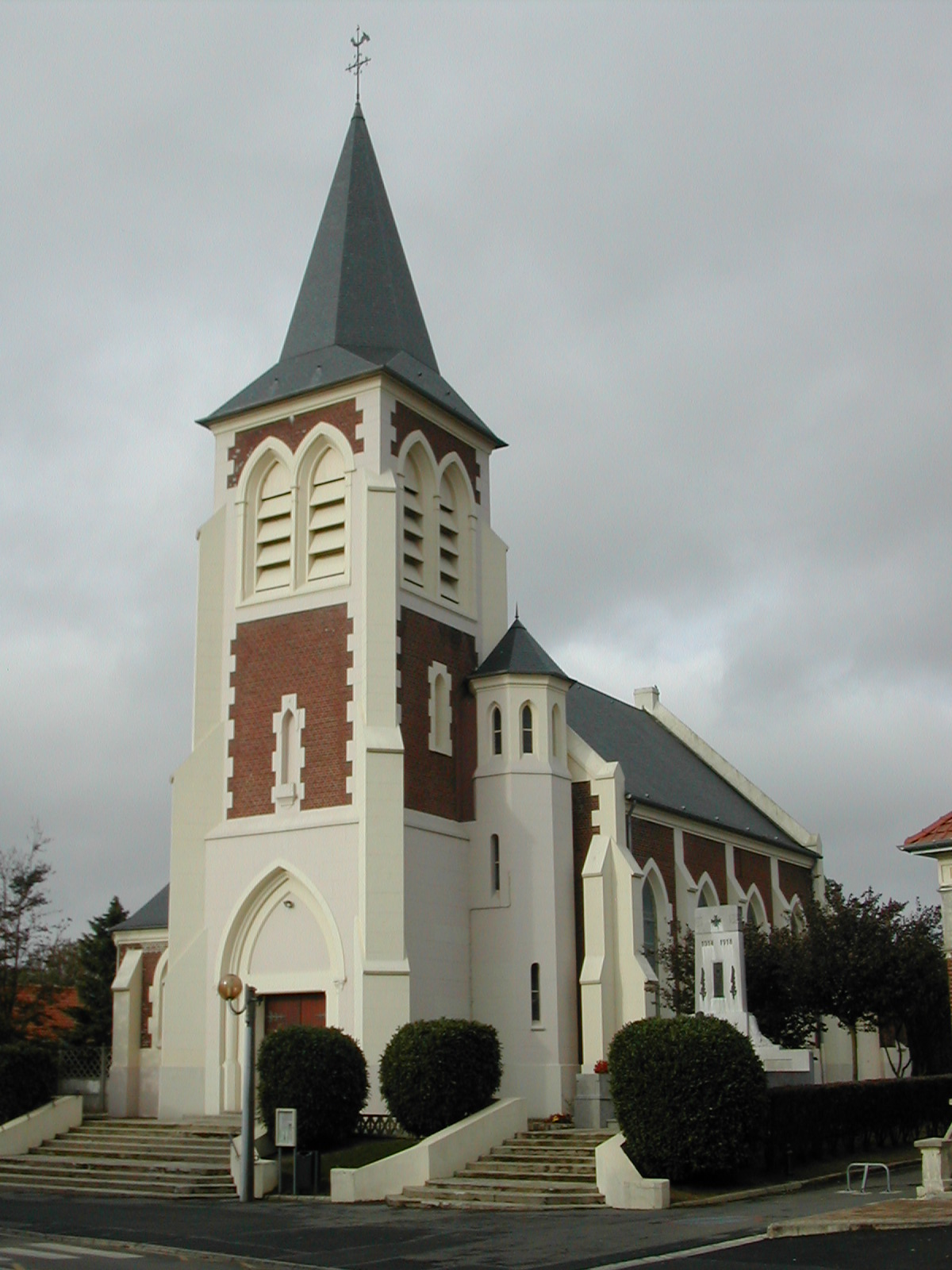 L'église Saint-Léger de Mercatel.